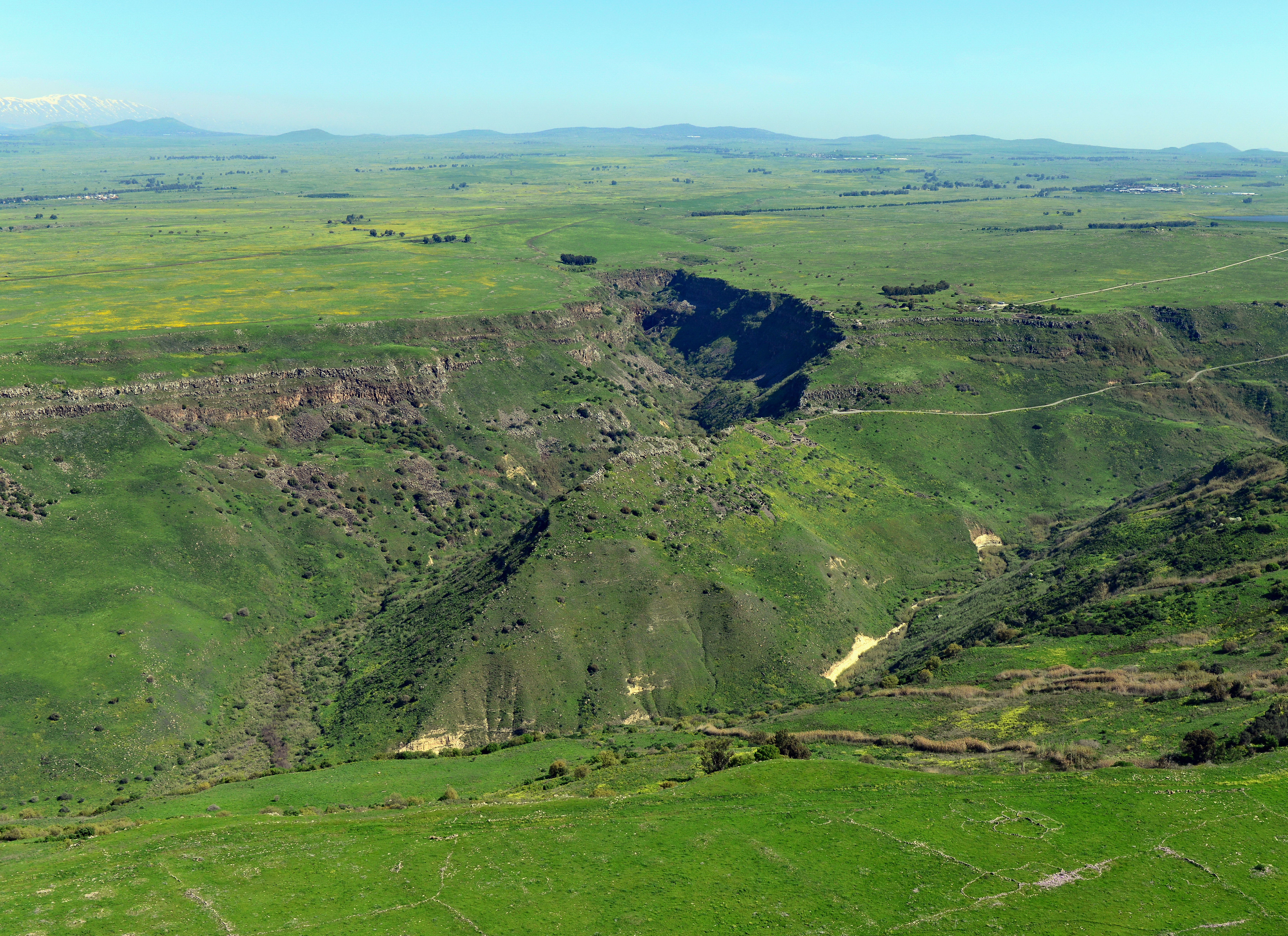 גמלא הייתה עיר ברמת הגולן שחרבה במרד הגדול בסוף ימי הבית השני